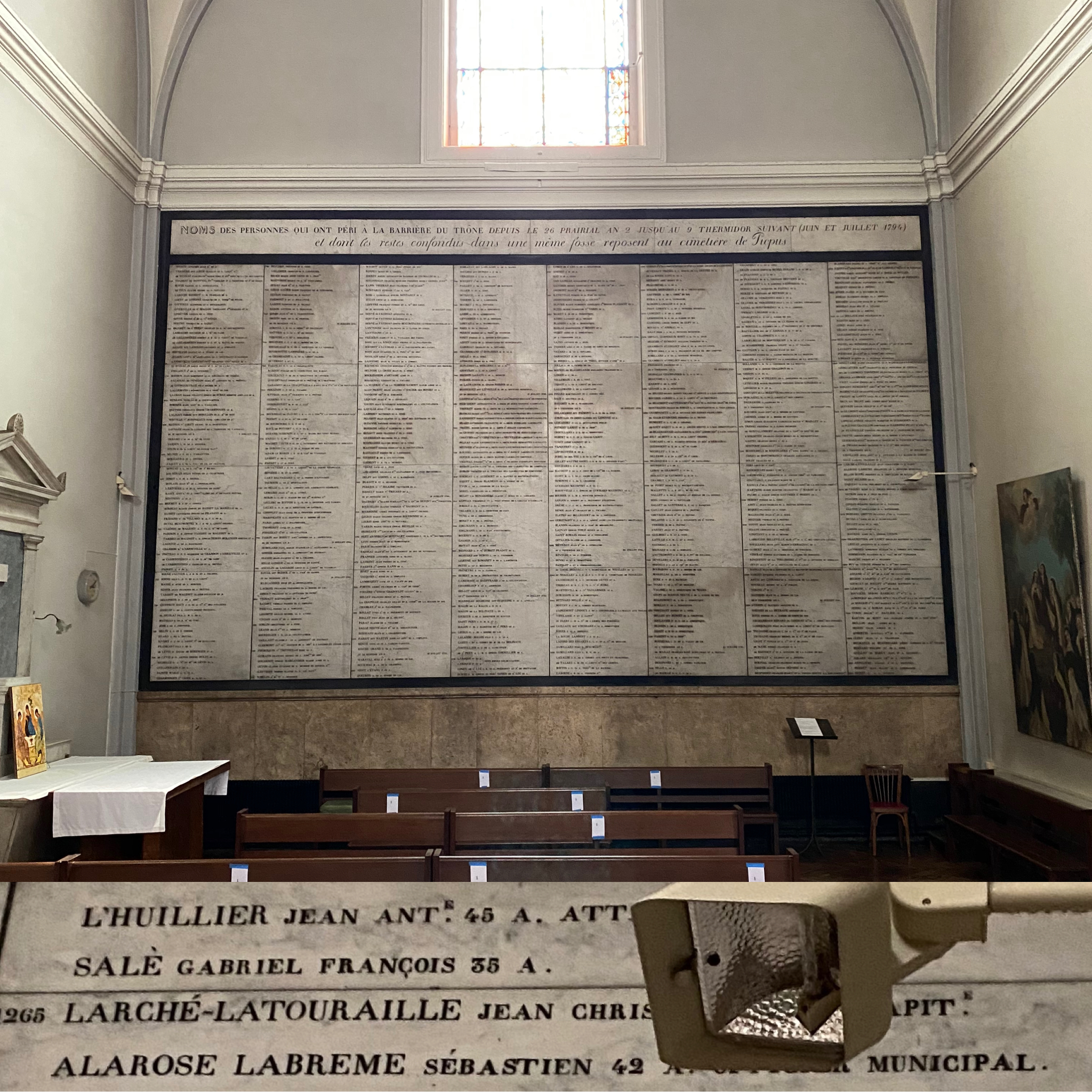 En Haut : Plaque en hommage des guillotinés de la place de la Nation. En bas : zoom sur le nom de Jean-Chrysostôme Larcher